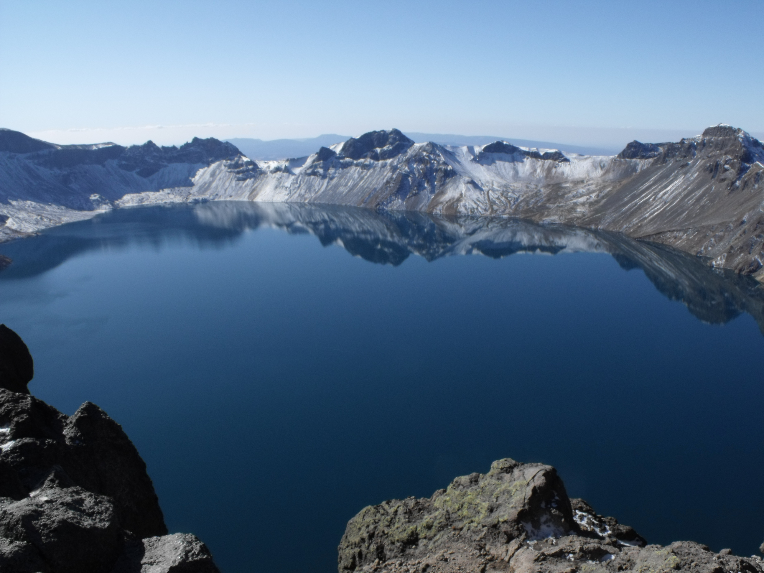 长白上中国一侧拍摄。